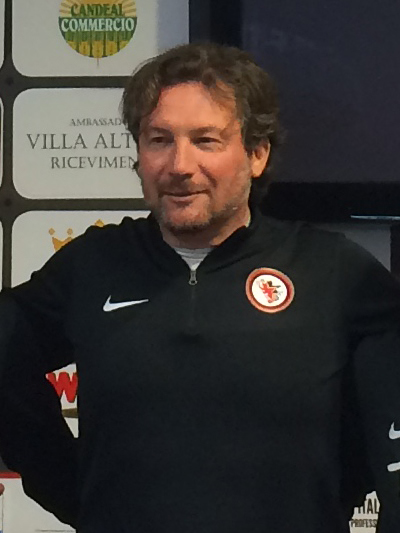 L'allenatore, ed ex giocatore italiano, Giovanni Stroppa